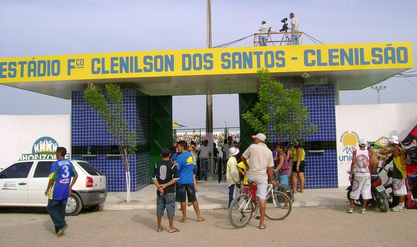 Estádio Francisco Clenilson dos Santos (Clenilsão), em Horizonte, Ceará, Brasil.